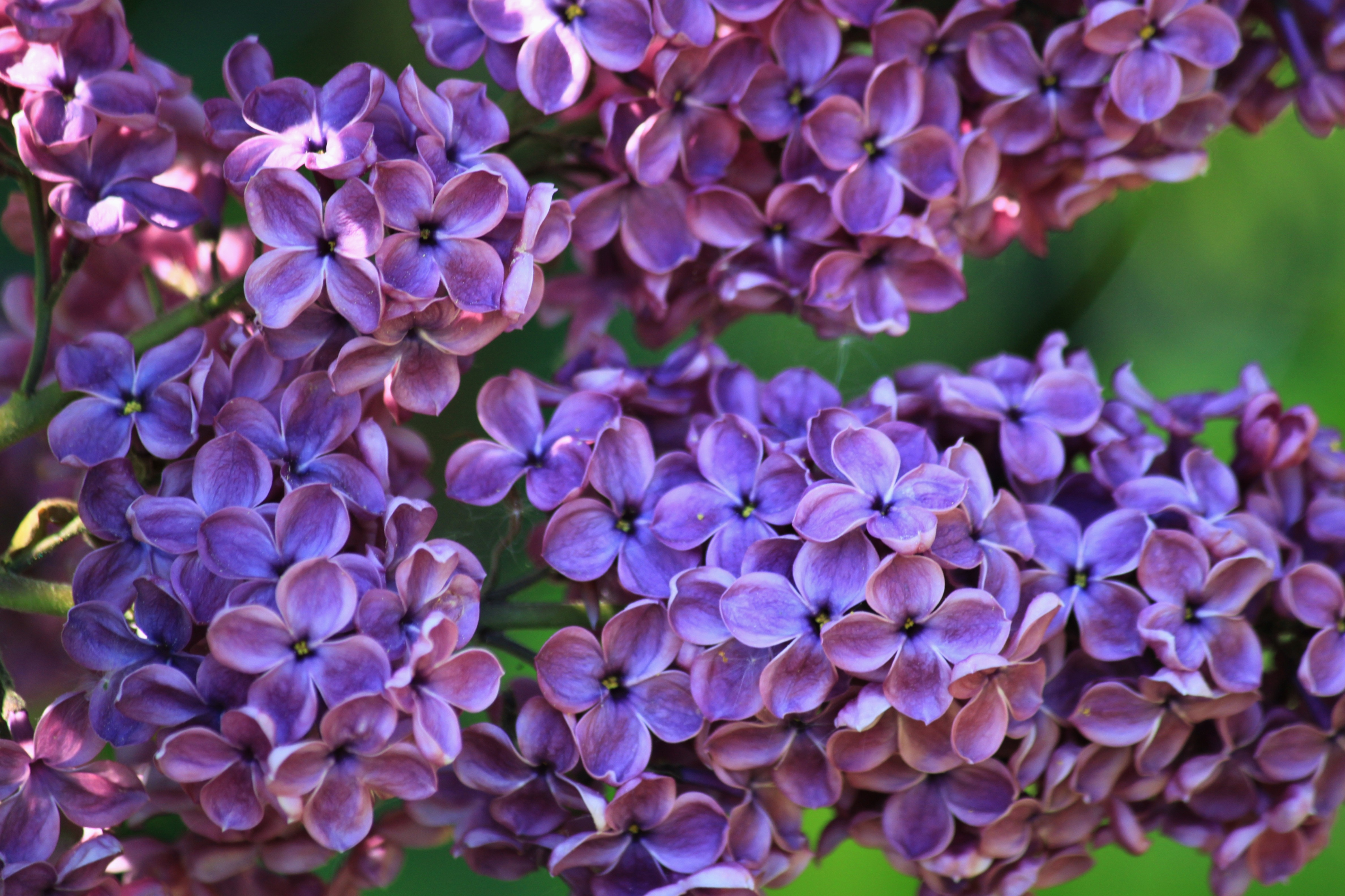 Kwiaty bzu English | Polski | +/−